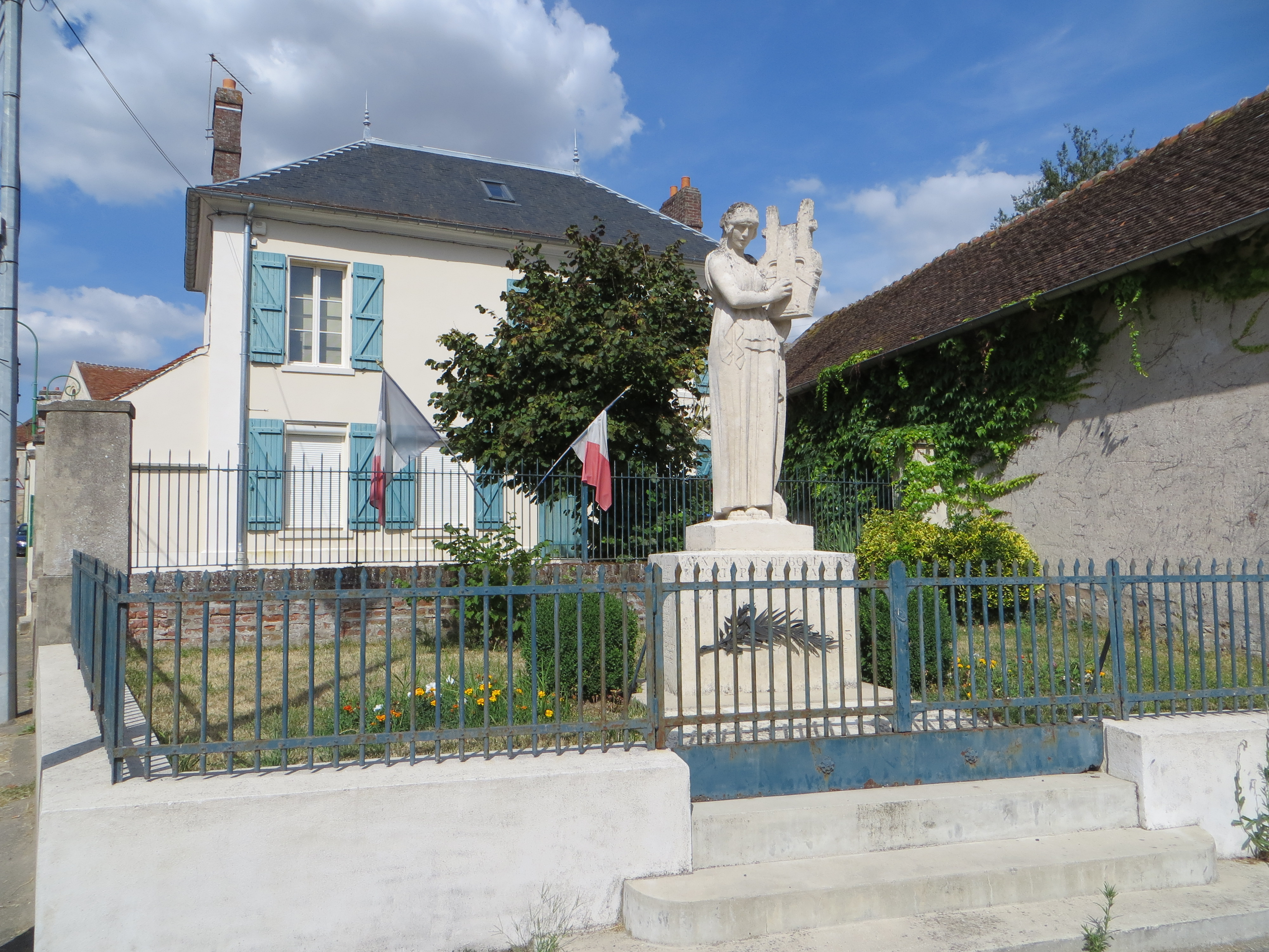 Monuments aux morts et mairie